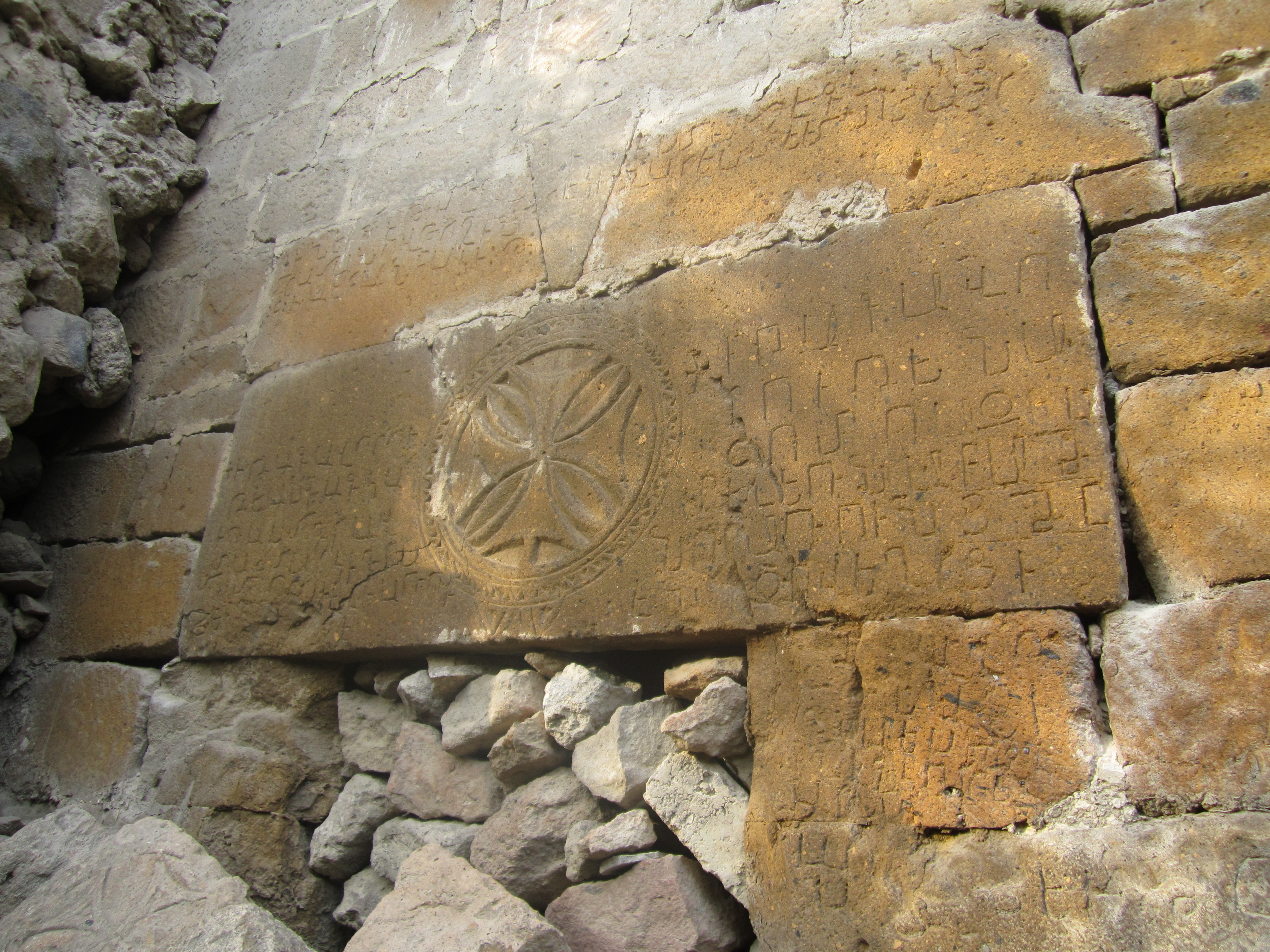 Փարպիի 5-րդ դարի Ծիրանավոր եկեղեցին 110/6